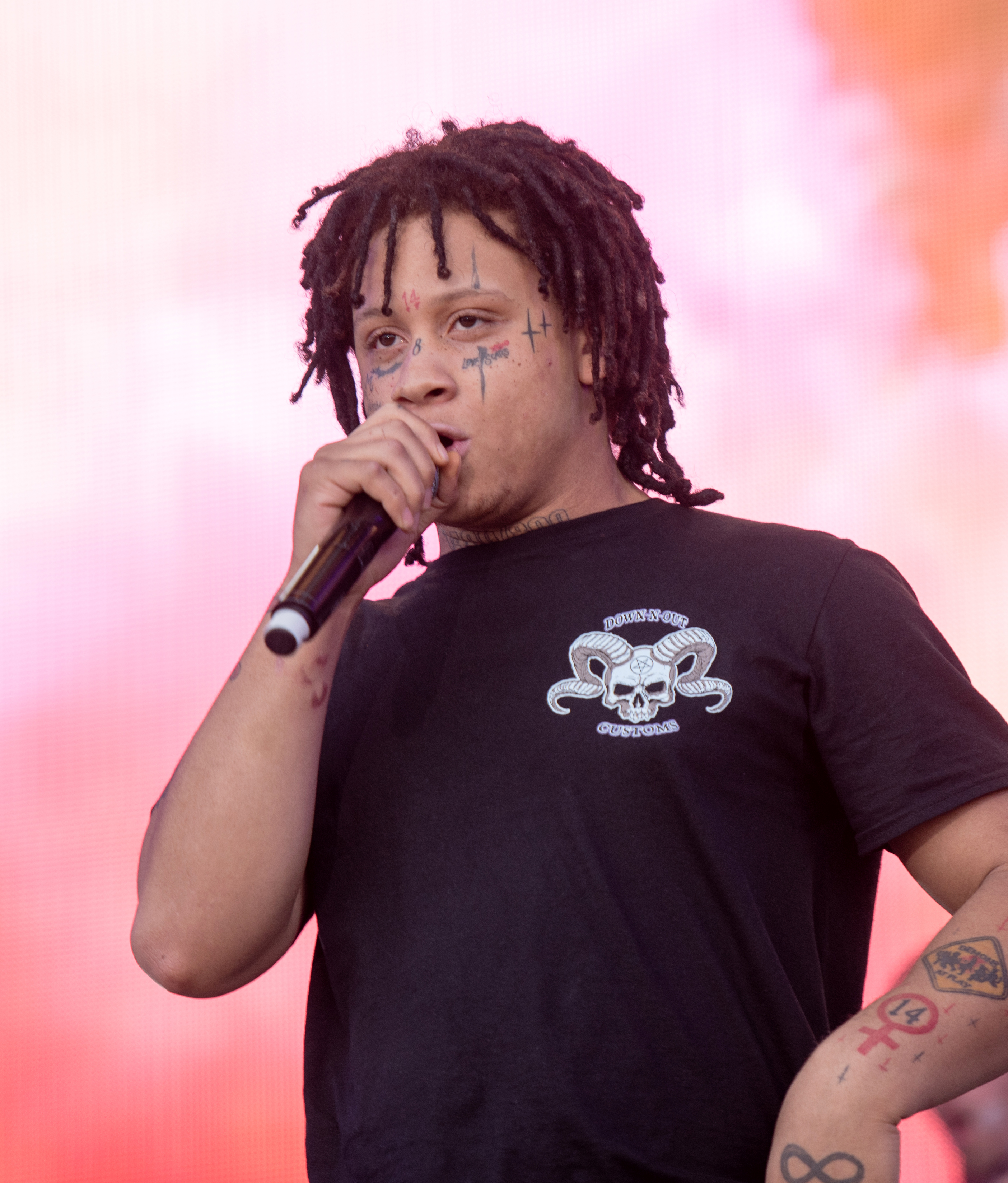 Trippie Redd live auf dem Openair Frauenfeld 2019